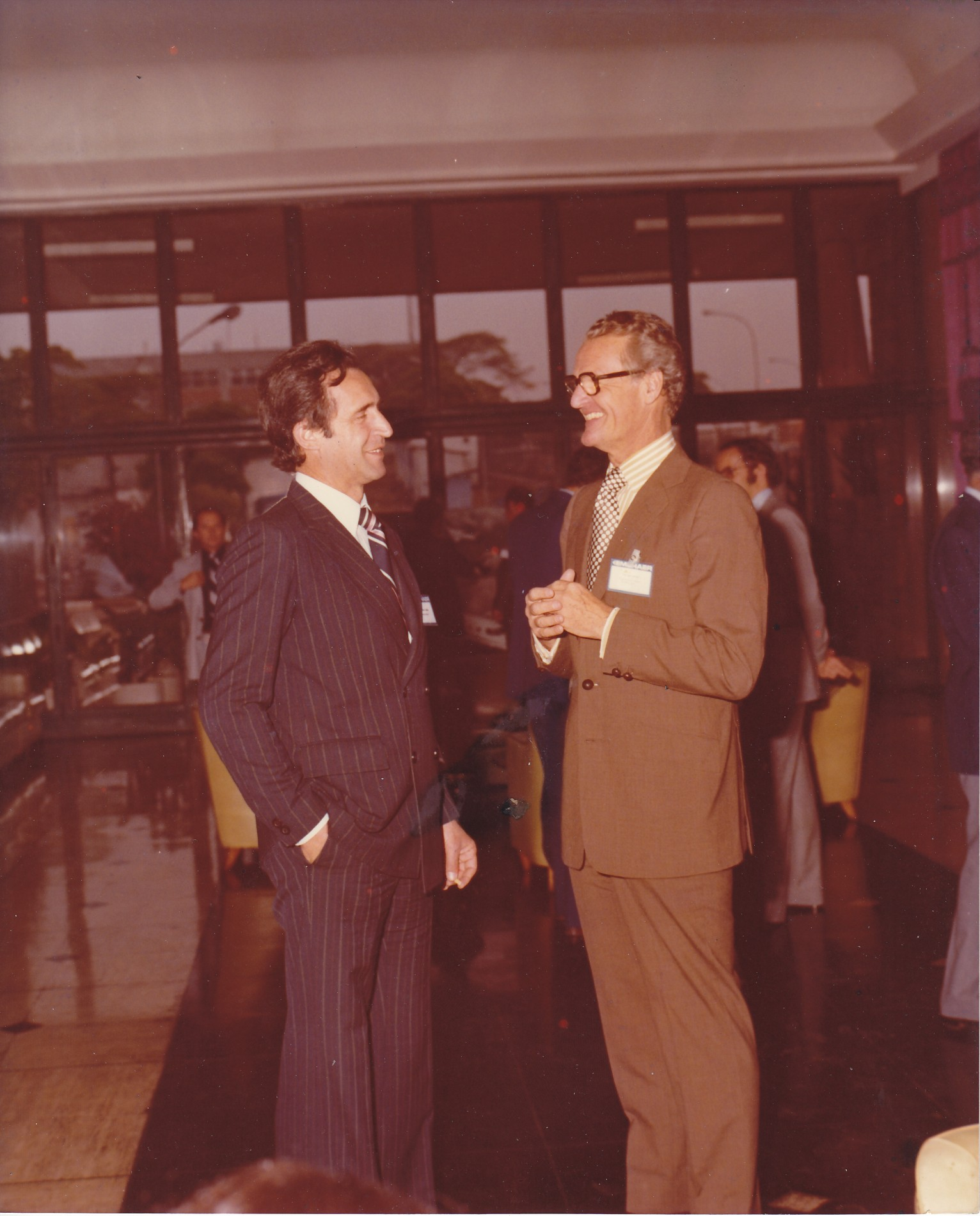 Guido Pessotti e Lord Waterpark na Inglaterra em evento na CommonWealth.